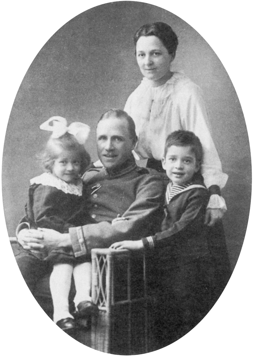 Der Heilbronner Verleger Viktor Kraemer junior (1881-1937) mit Frau Agnes und den Kindern Irene und Hans (* 1910). Foto ca. 1915.